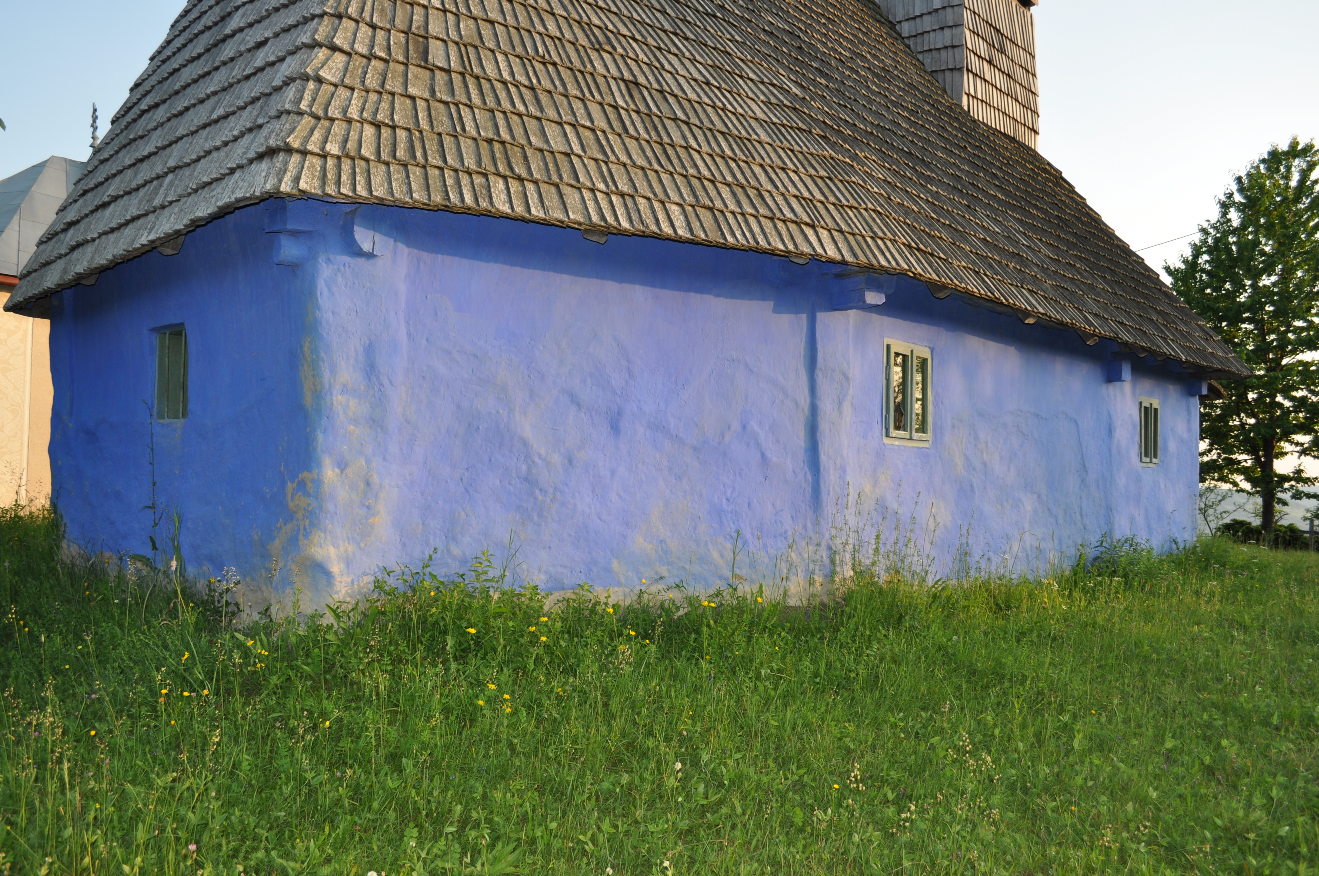 Biserica de lemn "Sfinții Împăraţi" din Aspra